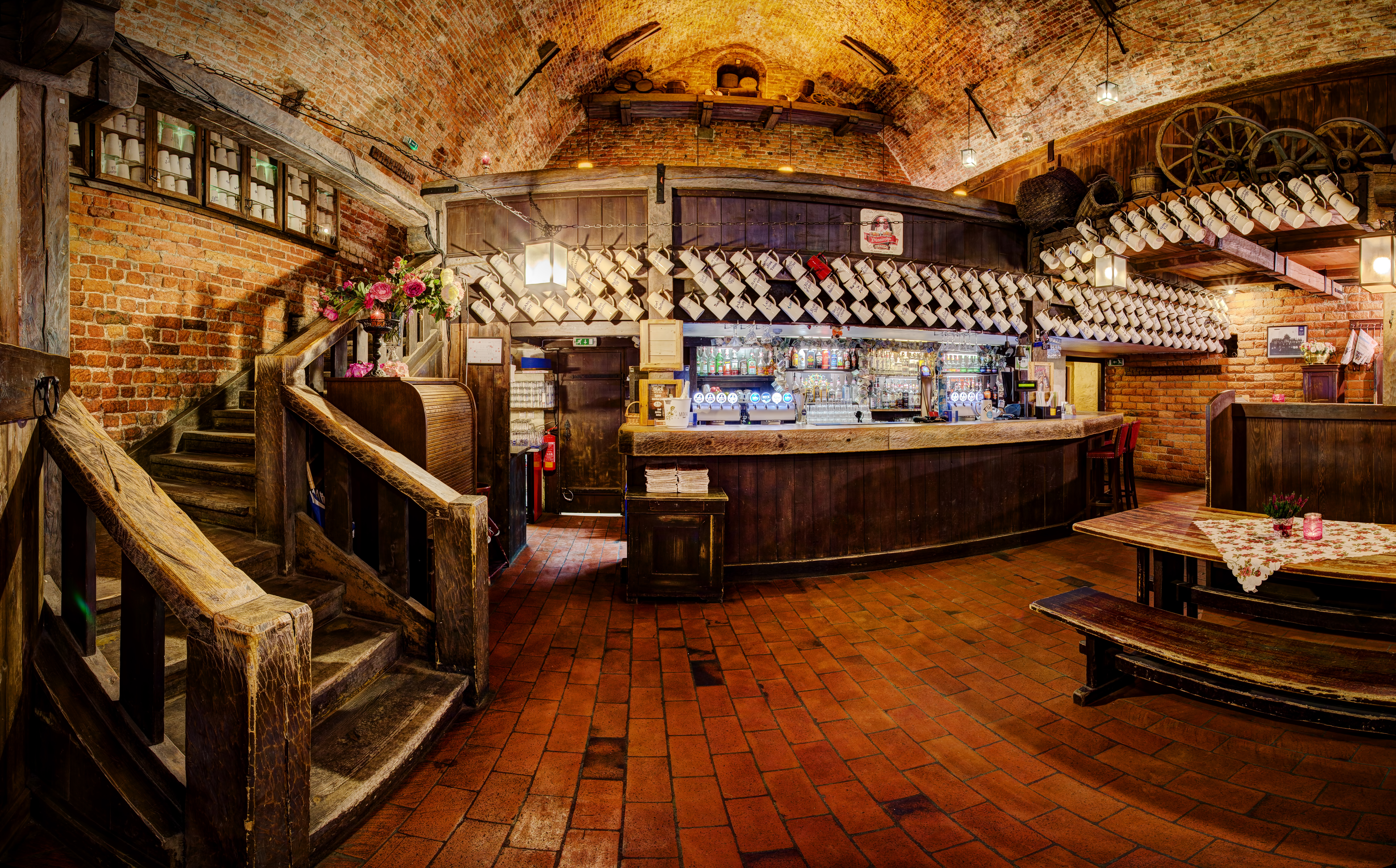 Püssirohukeldri sisevaade.